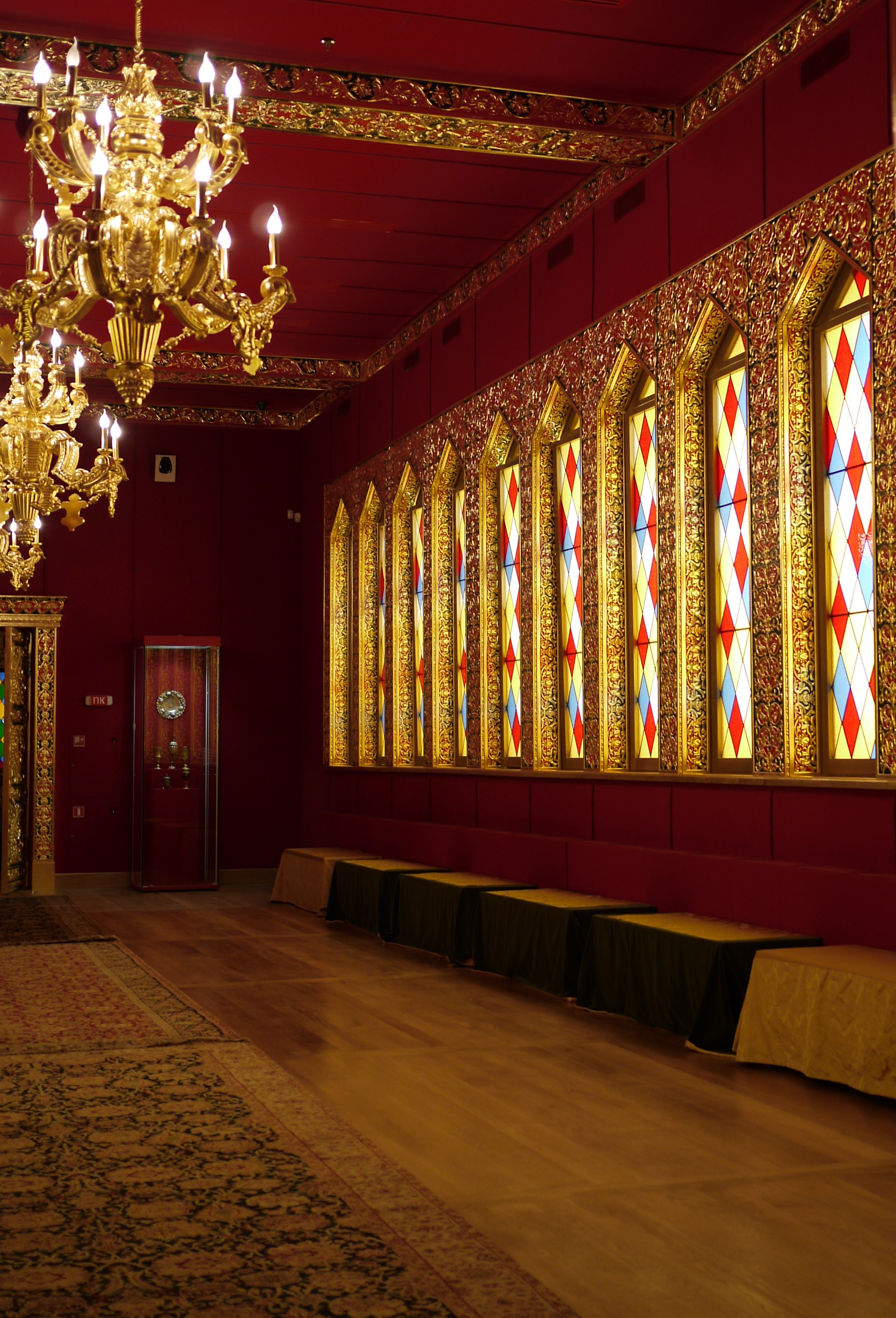 Зал в Коломенском